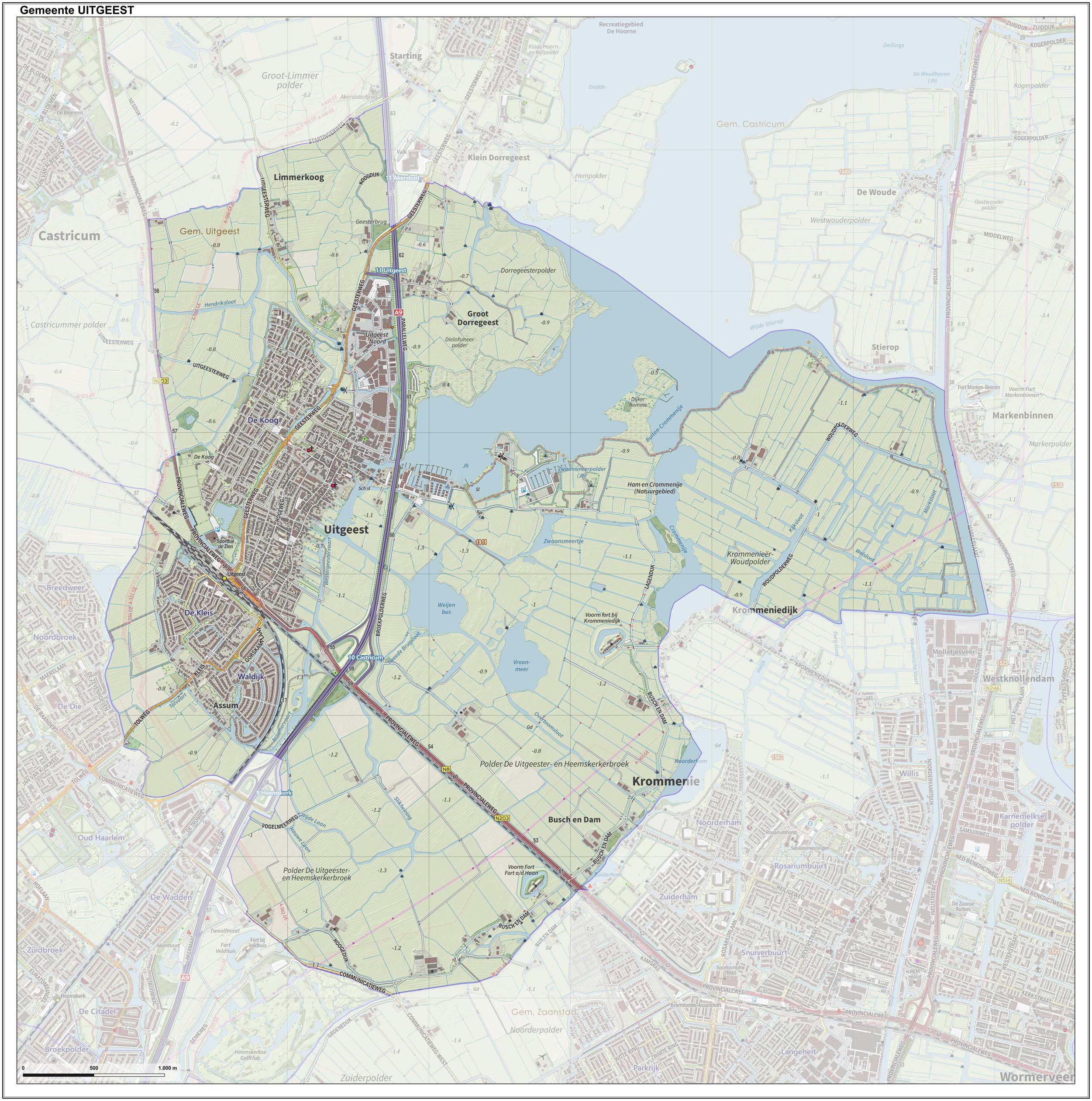 Topografische gemeentekaart. Resolutie: 400 pixels/km. Kaartbeeld samengesteld uit de open geodata van de Top10NL en Top25namen (Kadaster), Creative Commons-BY licentie. Gebouwvlakken uit open geodata BAG extract. Wegen uit de OpenStreetMap, OpenStreetMap community. Reliëfschaduw uit de Actuele Hoogtekaart AHN2. Samenstelling en kleurenschema: Jan-Willem van Aalst, met QGIS. Zie ook de Legenda.